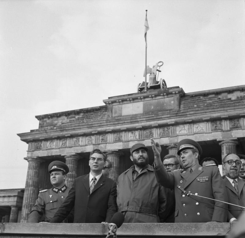 Berlin, Fidel Castro an der Grenze Berlin: Castro / Die Partei- und Regierungsdelegationen unter Leitung des Ersten Sekretärs der KPK und Ministerpräsidenten der Revolutionären Regierung der Republik Kuba, Fidel Castro(M), besichtigte am 14.6.1972 die Staatsgrenze der DDR zu Westberlin. Die Delegation, von Werner Lamberz, Mitglied des Politbüros und Sekretär des ZK der SED (2.v.l.), und anderen Persönlichkeiten, begleitet, wurde von Generalleutnant Arthur Kunath, Stadtkommandant von Berlin (2.v.r.), informiert. Rechts: Carlos Rafael Rodriguez, Mitglied des Sekretariats des ZK der KPK und Minister der Revolutionären Regierung. Abgebildete Personen: Castro, Fidel: Ministerpräsident, Vorsitzender der KP, Kuba Lamberz, Werner: Politbüro des ZK der SED, Leiter der Abteilung Agitation beim ZK, DDR (GND 124666779) Kunath, Arthur: Stadtkommandant von Berlin, Generalleutnant, DDR